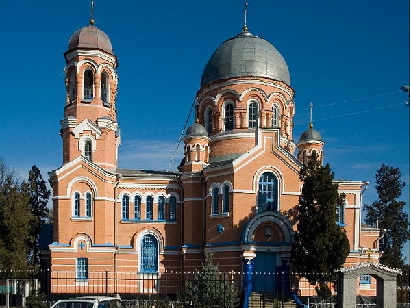 Храм в городе Майский